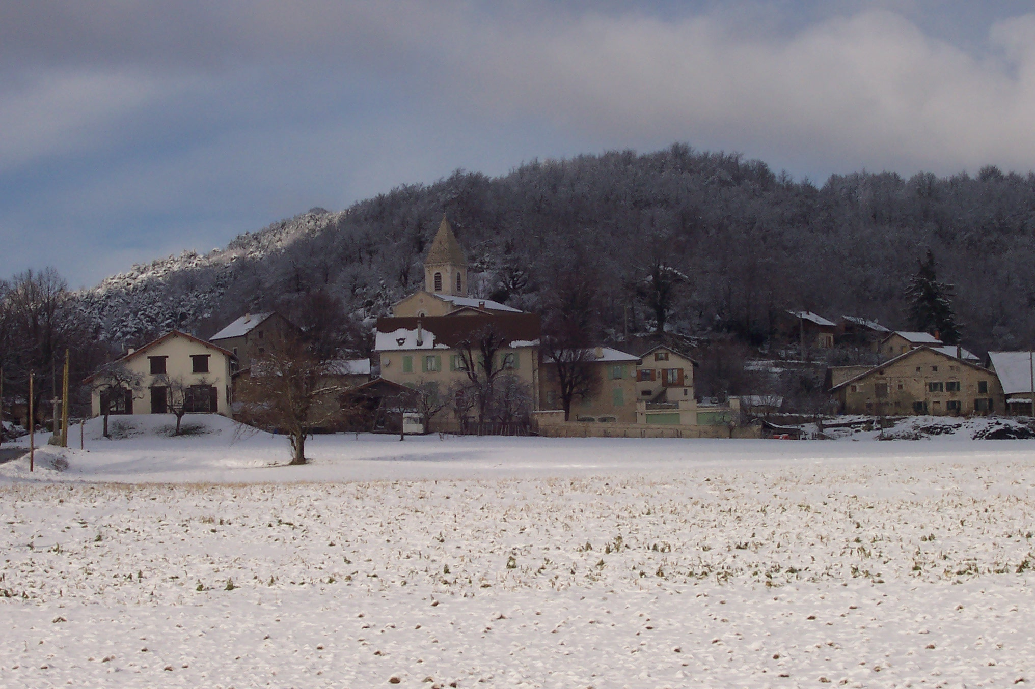 village de Presles (38) en hiver